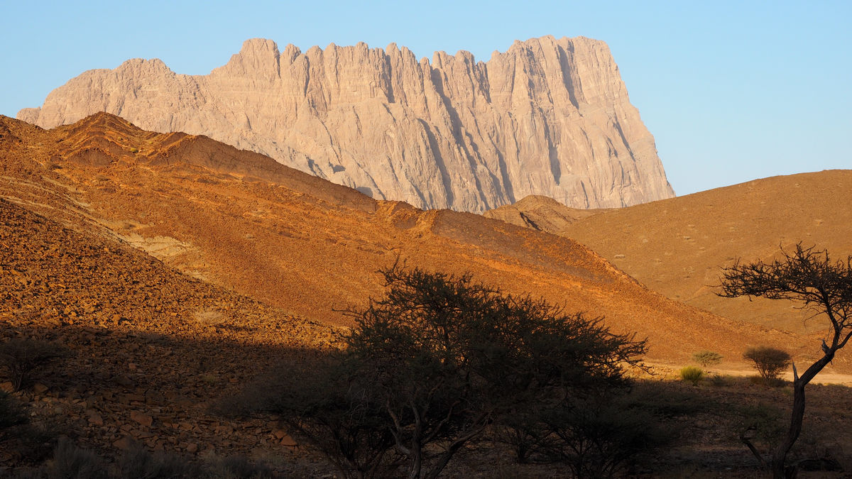 der etwa 2.000m hohe Dschabal Mischt im Abendlicht